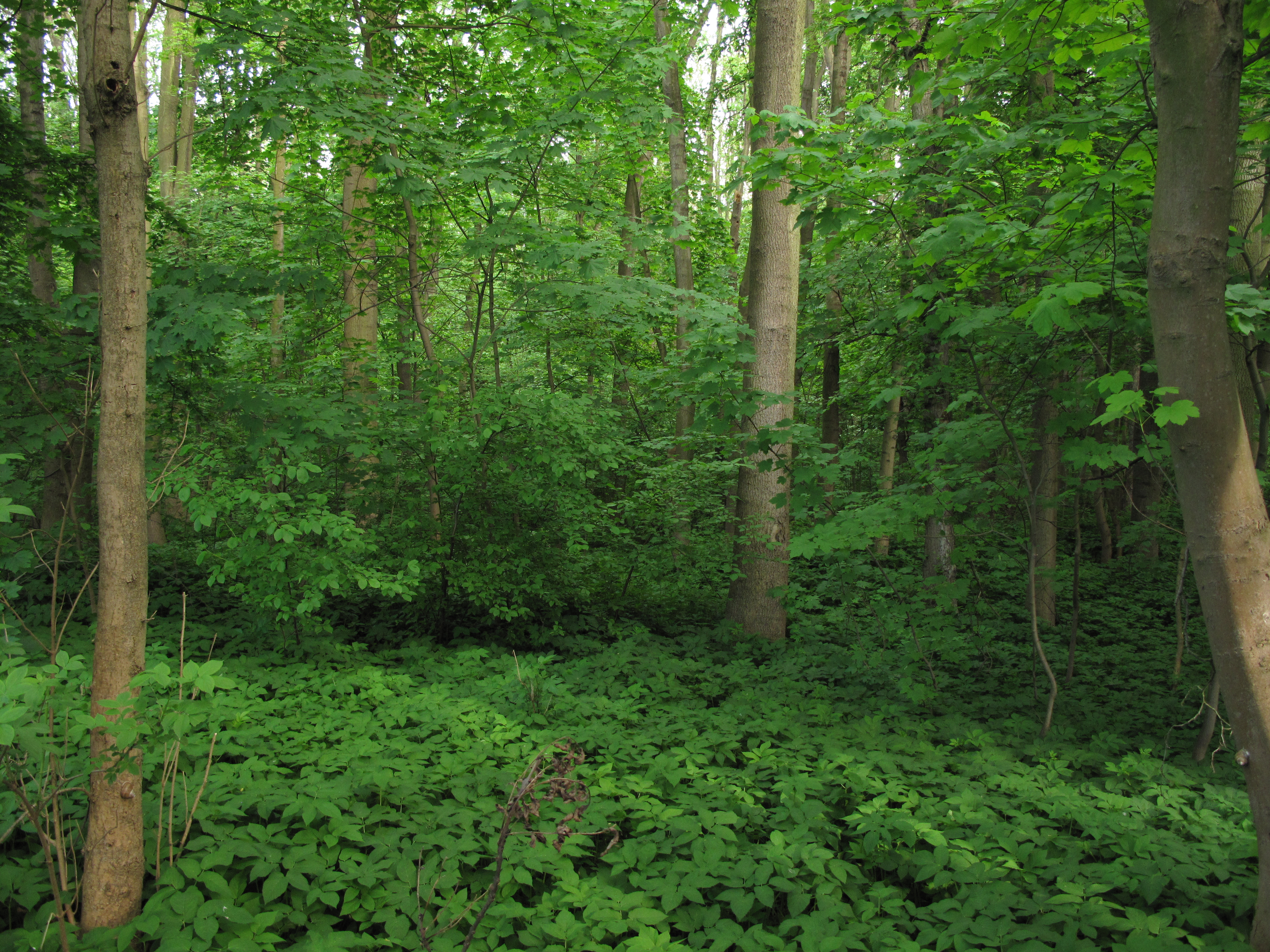 Přírodní rezervace Loužek. Okres Litoměřice, Česká republika.